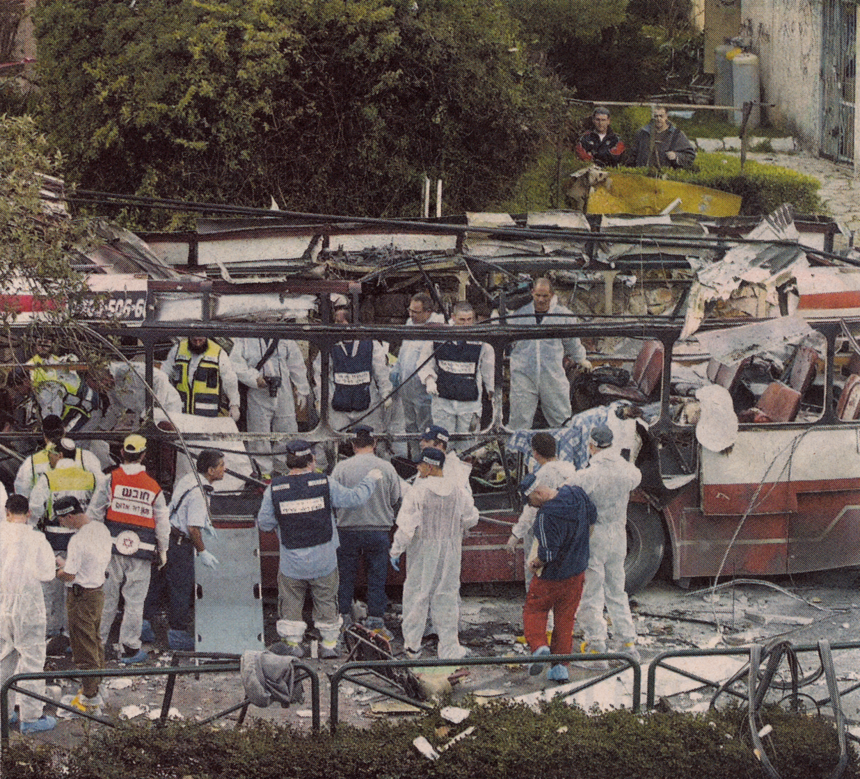 záchranáři a policisté u trosek autobusu po útoku 5.3.2003 v Haifě